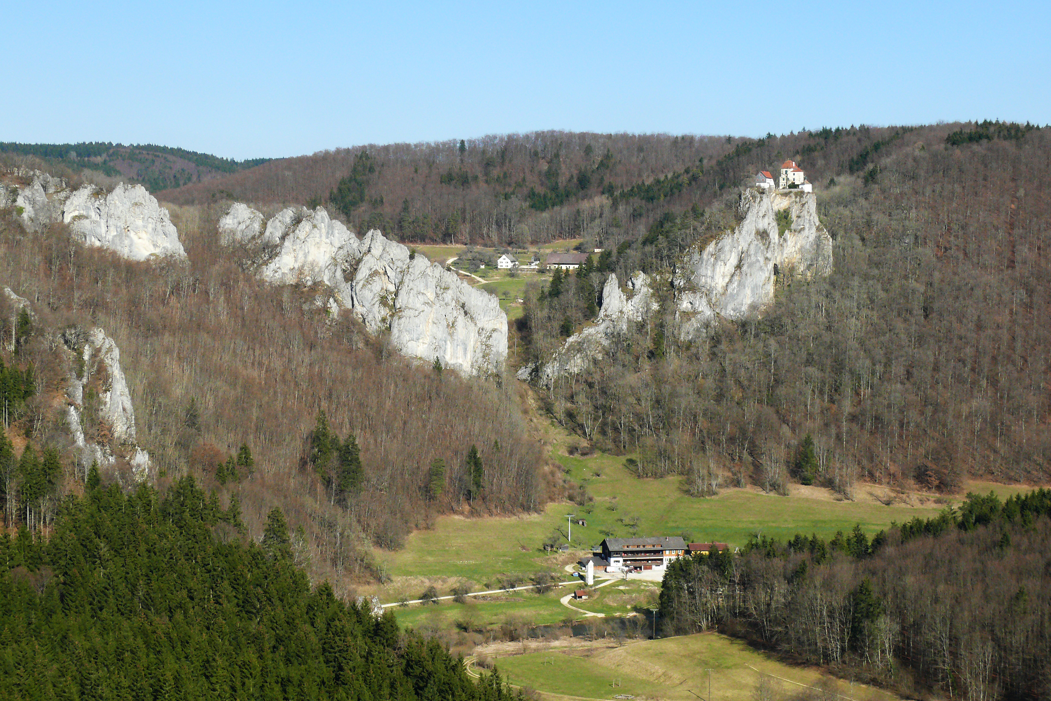 Naturschutzgebiet „Stiegelesfels-Oberes Donautal“ (NSG:BW-3.271). Kennung: WDPA 82645. Geologieː Hinter der Felsformation liegt eine ausgeräumte „Zementmergelschüssel", die durch die tiefe Erosion der Donau angeschnitten wurde.